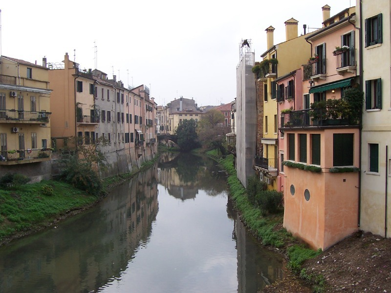 Padova - Fiume Bacchiglione